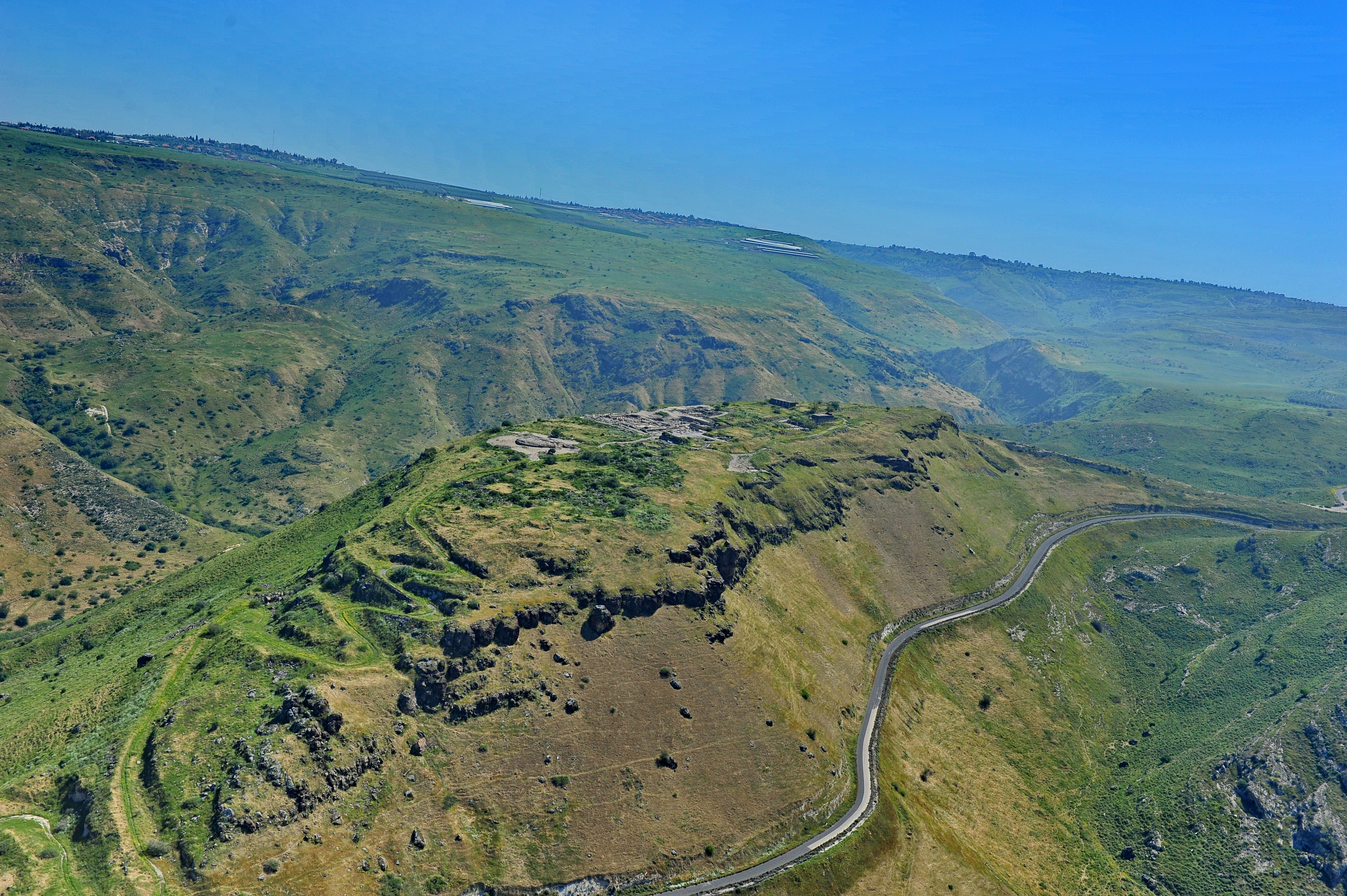 סוסיתא נוסדה כעיר מדינה (פוליס) ככל הנראה באמצע המאה ה-2 לפנה"ס בידי הממלכה הסלאוקית.